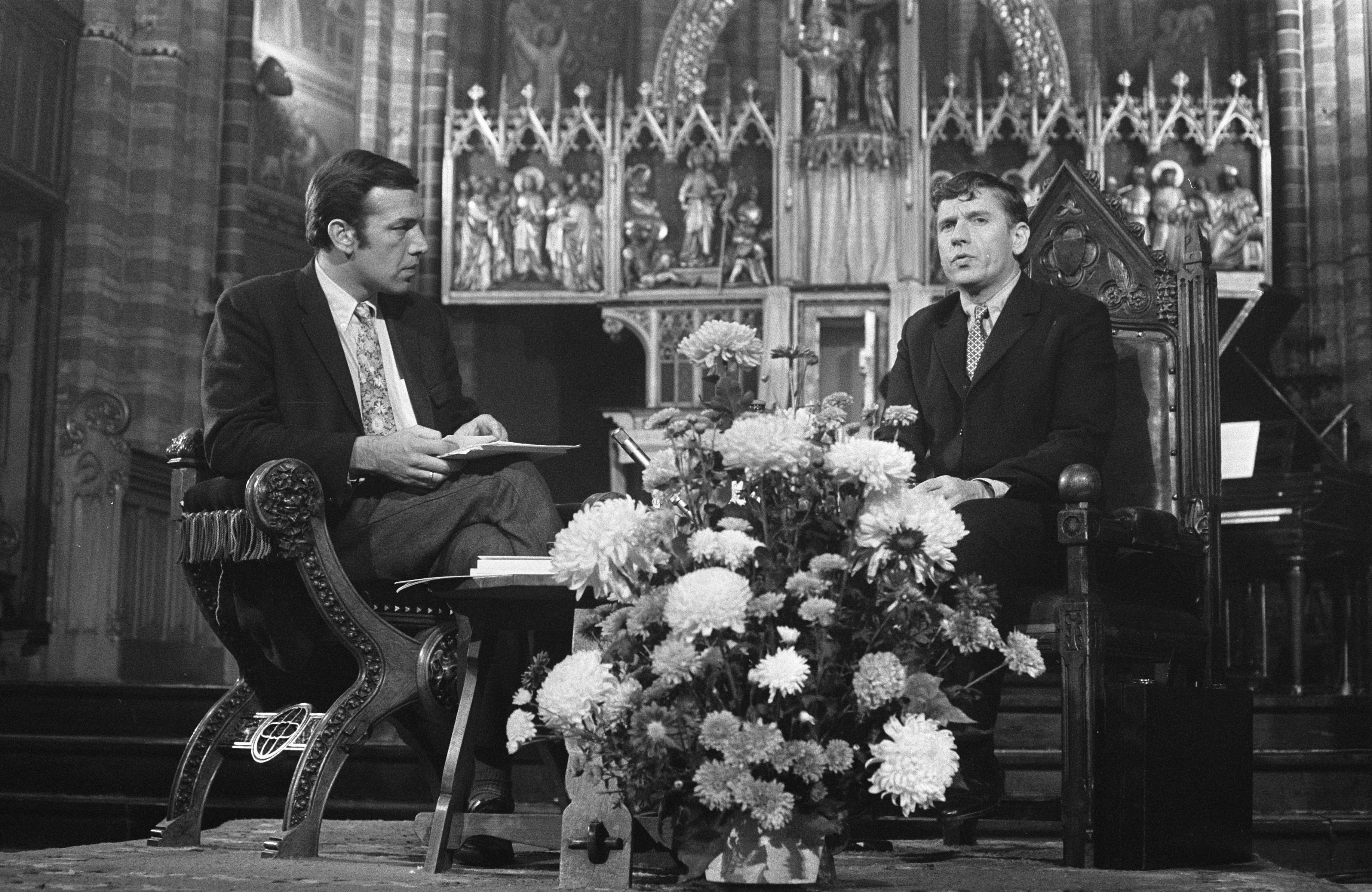 Collectie / Archief : Fotocollectie Anefo Reportage / Serie : [ onbekend ] Beschrijving : Huldiging Gerard K. van het Reve i.v.m. de toekenning van de P.C. Hooftprijs in de kerk van het Allerheiligste Hart te Amsterdam. Van het Reve (rechts) en Hans Keller Datum : 23 oktober 1969 Locatie : Amsterdam, Noord-Holland Trefwoorden : auteurs, huldigingen, kerken, schrijvers, televisie Persoonsnaam : Keller, Hans, Reve, Gerard, Reve, Gerard van het Fotograaf : Verhoeff, Bert / Anefo Auteursrechthebbende : Nationaal Archief Materiaalsoort : Negatief (zwart/wit) Nummer archiefinventaris : bekijk toegang 2.24.01.05 Bestanddeelnummer : 922-8989